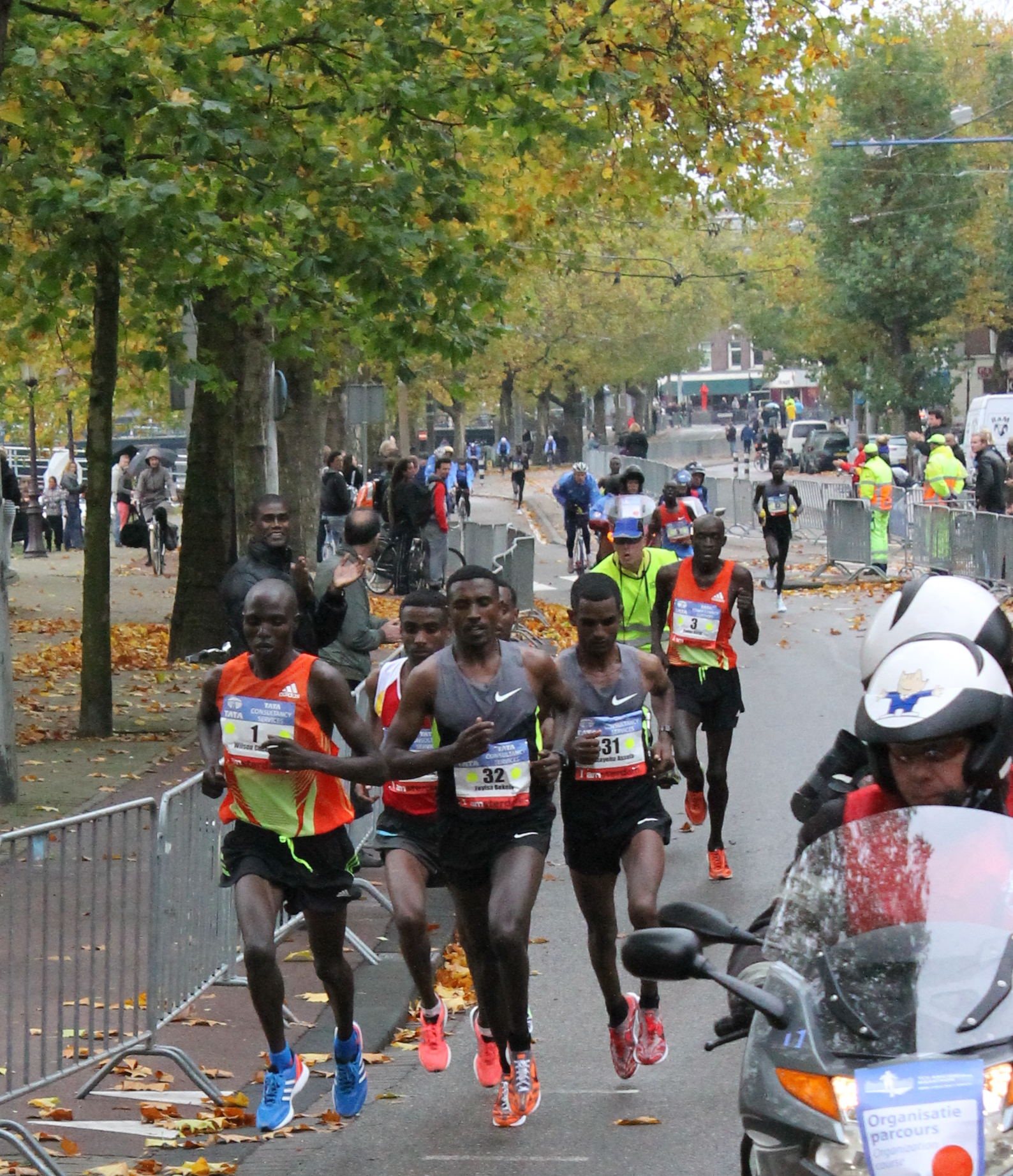 De kopgroep, voorbij het 30 km-punt. Vlnr: Wilson Chebet (KEN, 1), Abrha Gebretsadik (ETH), Feyisa Bekele (ETH, 32), Bentayehu Assefa (ETH, 31), Peter Kirui (KEN, 3).